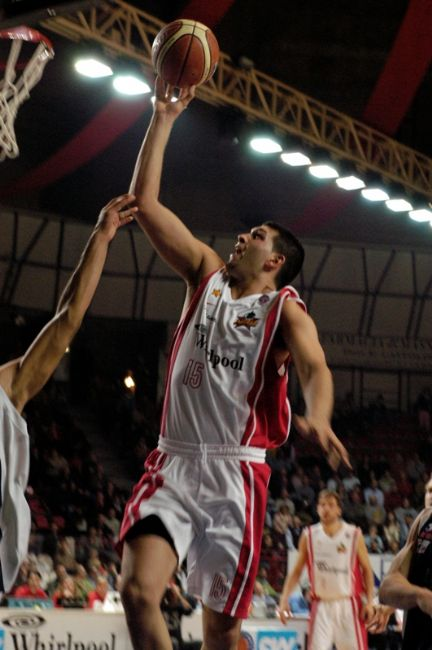 Il cestista Gabriel Fernández